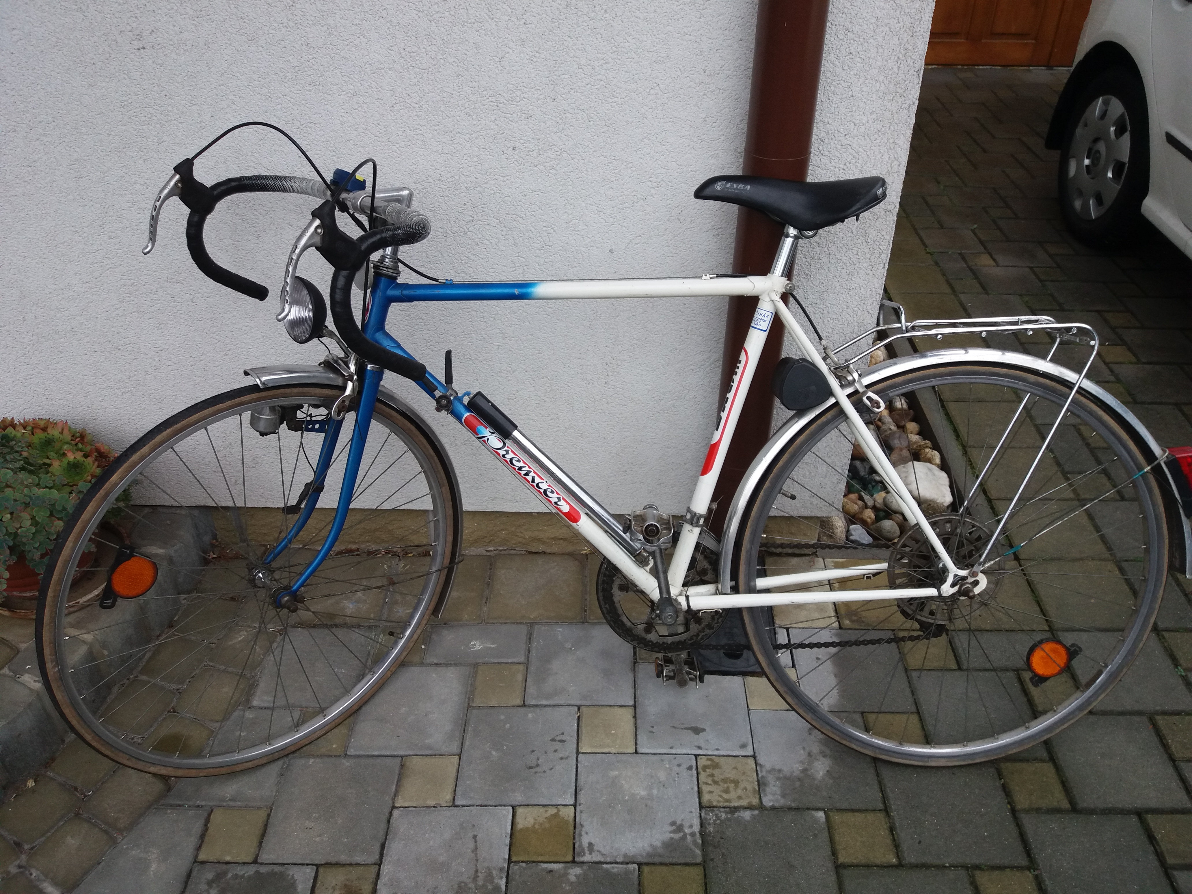 Pánské silniční kolo Eska Premier, 28", rok výroby 1991